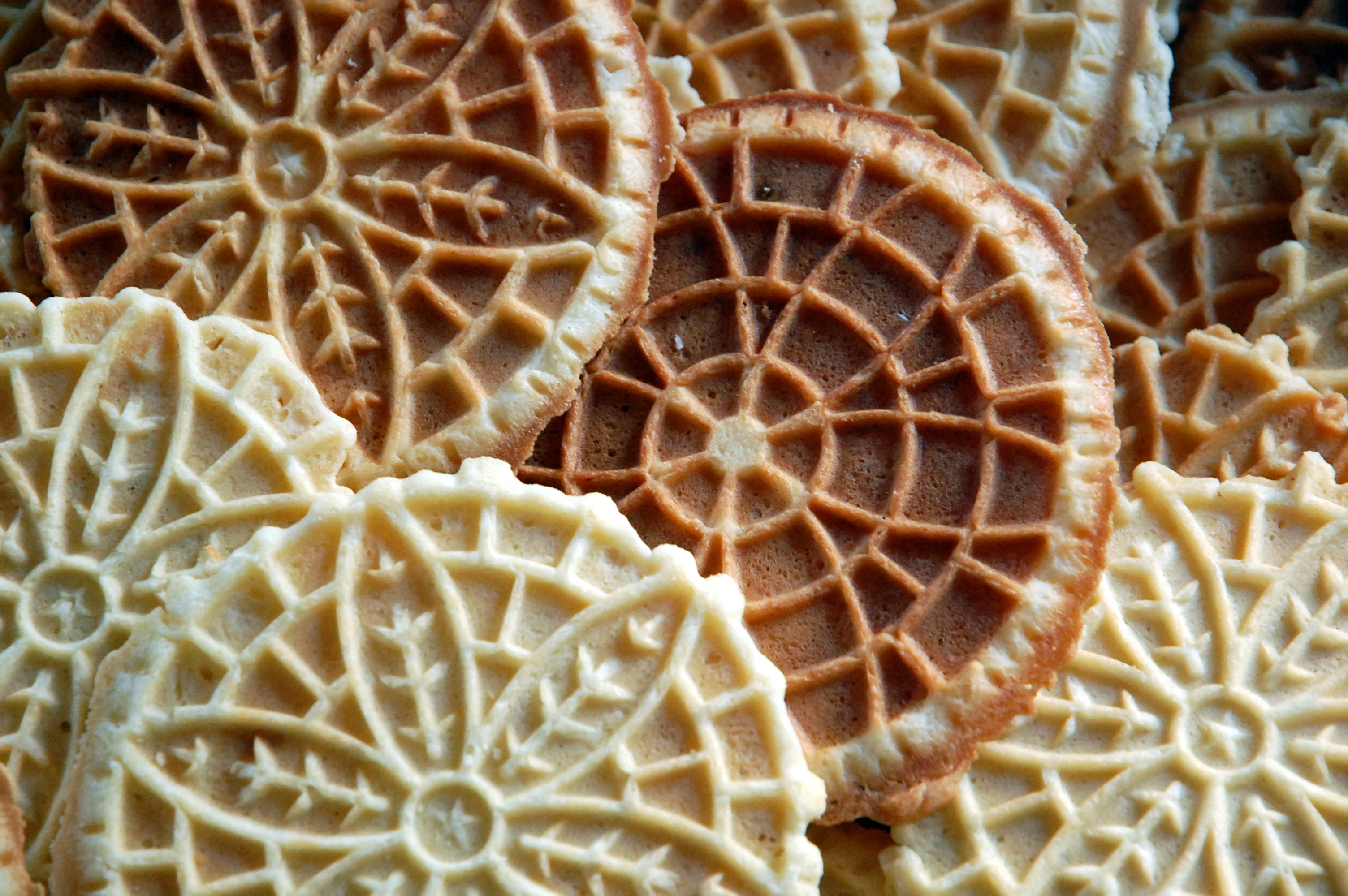 Pizzelle in a loose stack.